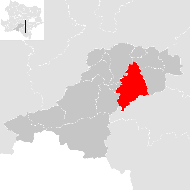 Bezirk Lilienfeld